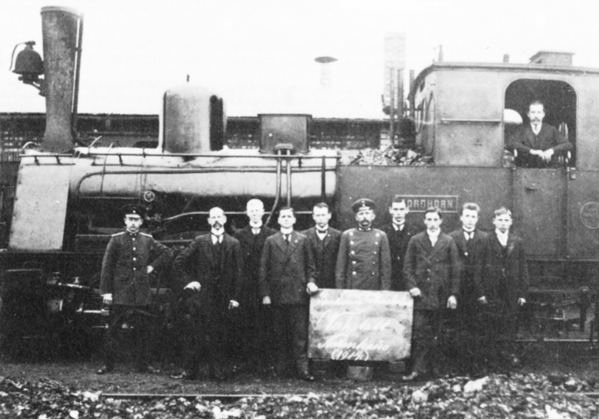 Personal der Werkstatt der Bentheimer Kreisbahn im Jahr 1914